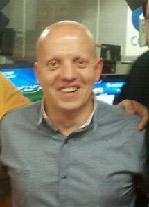 Marcos López en marzo de 2012, en los estudios de la COPE.